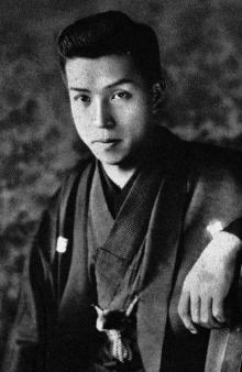 小金井勝、1920年代の写真